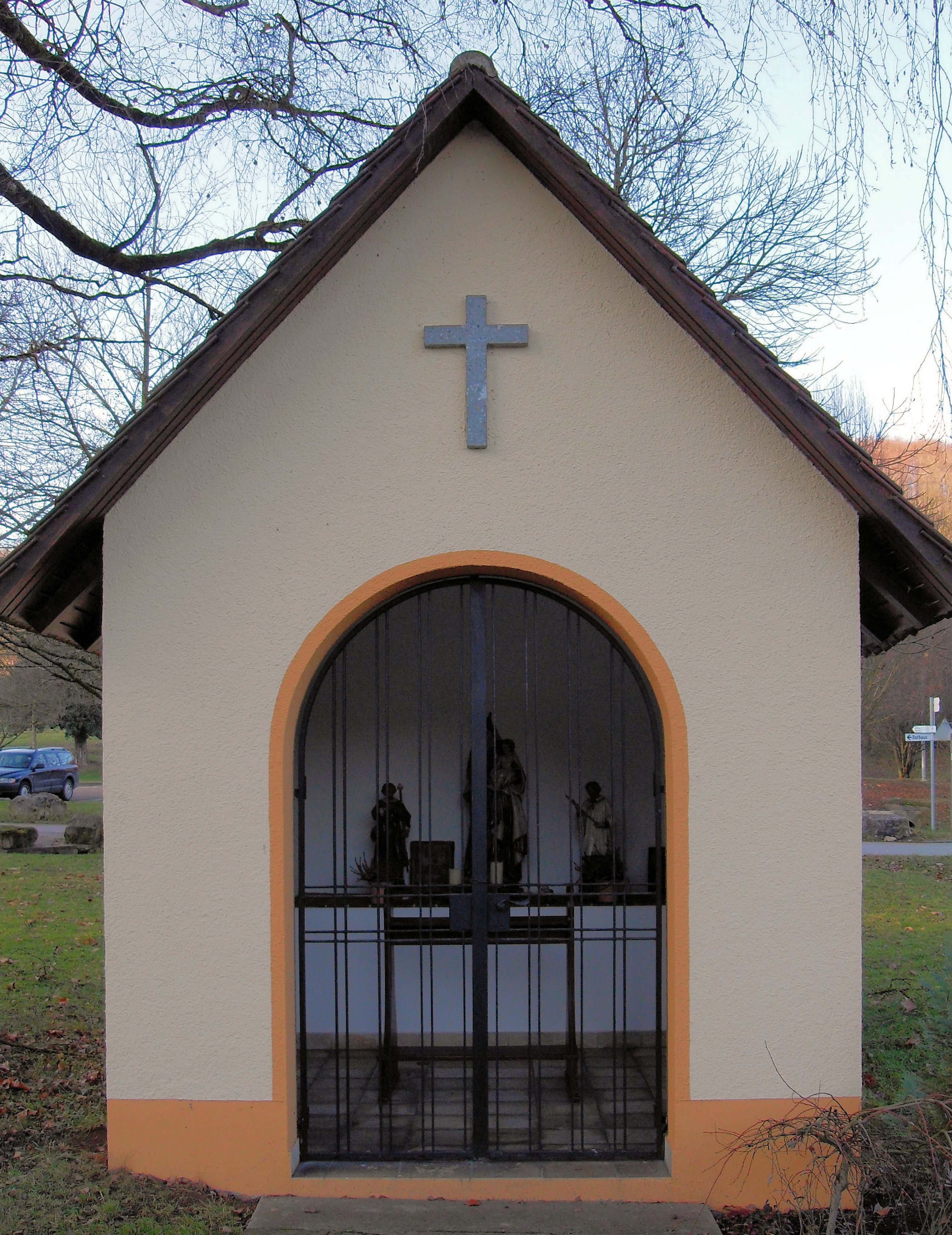 Muttergotteskapelle / Hirzlehofkapelle in Privatbesitz Bollschweil